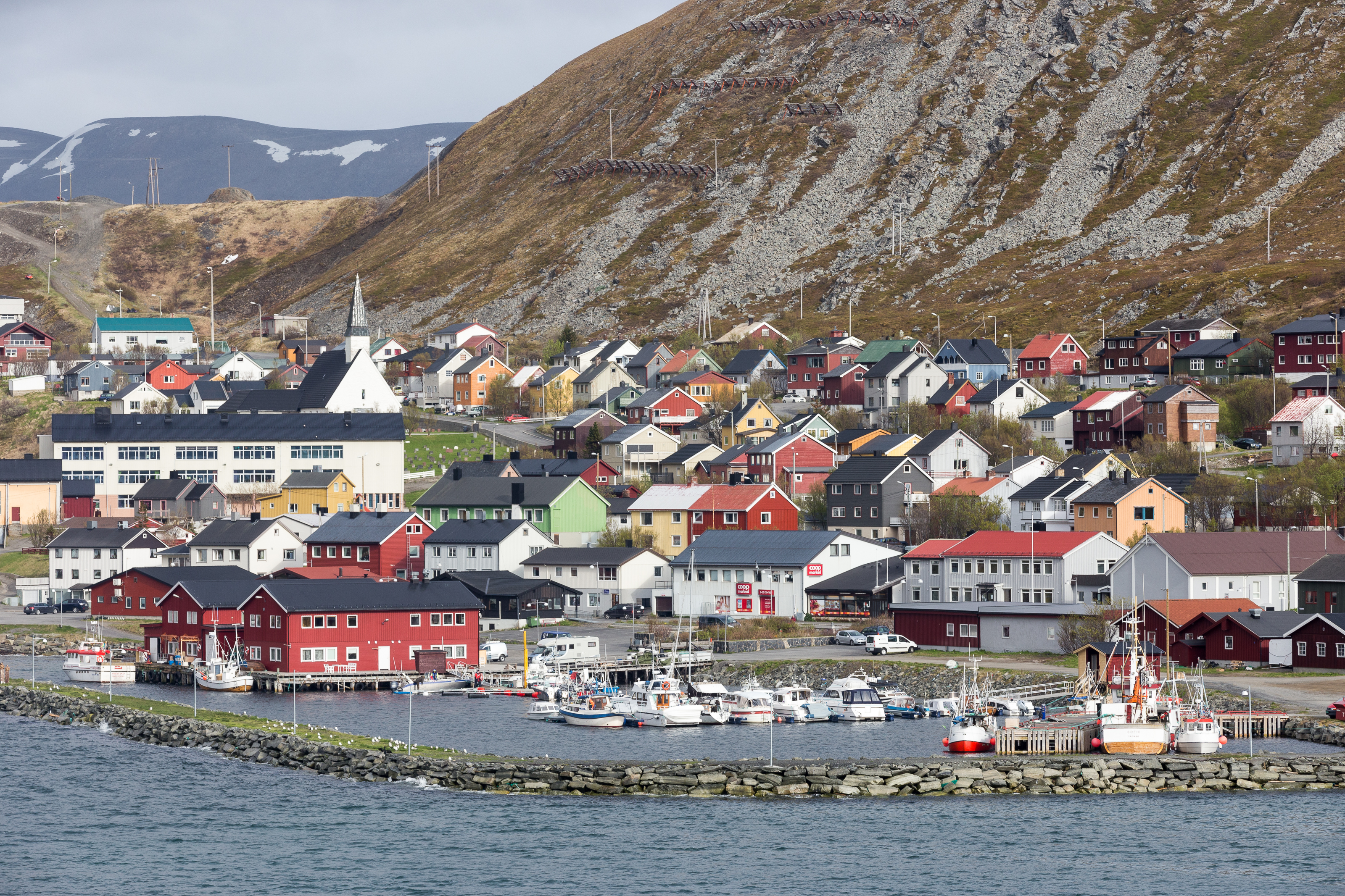 Kjøllefjord, Kommune Lebesby, Provinz Finnmark